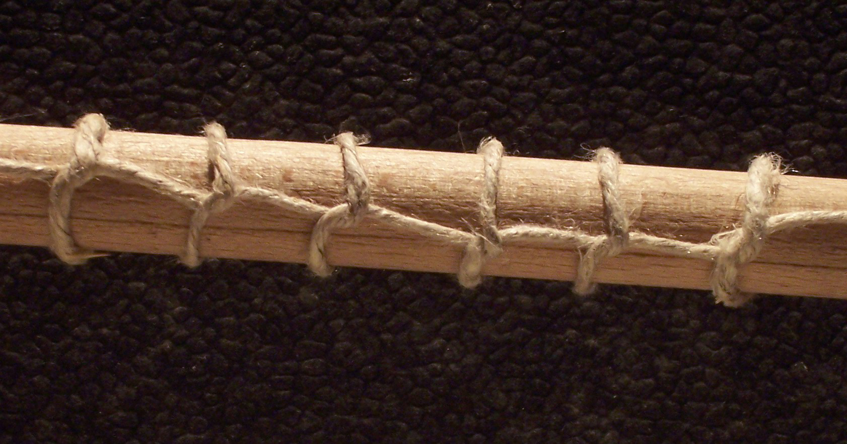 Marschlag, marl bend